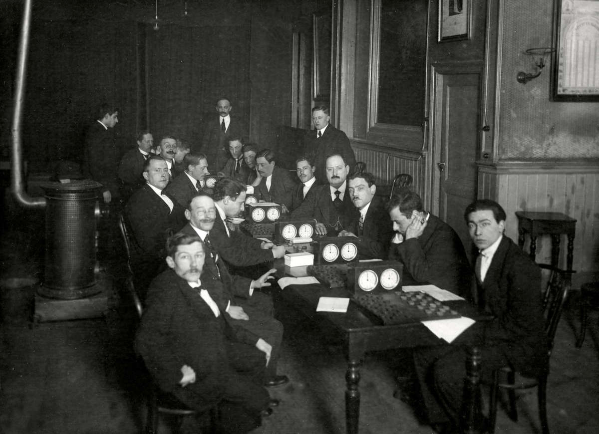 Het Kampioenschap dammen te Den Haag 1920